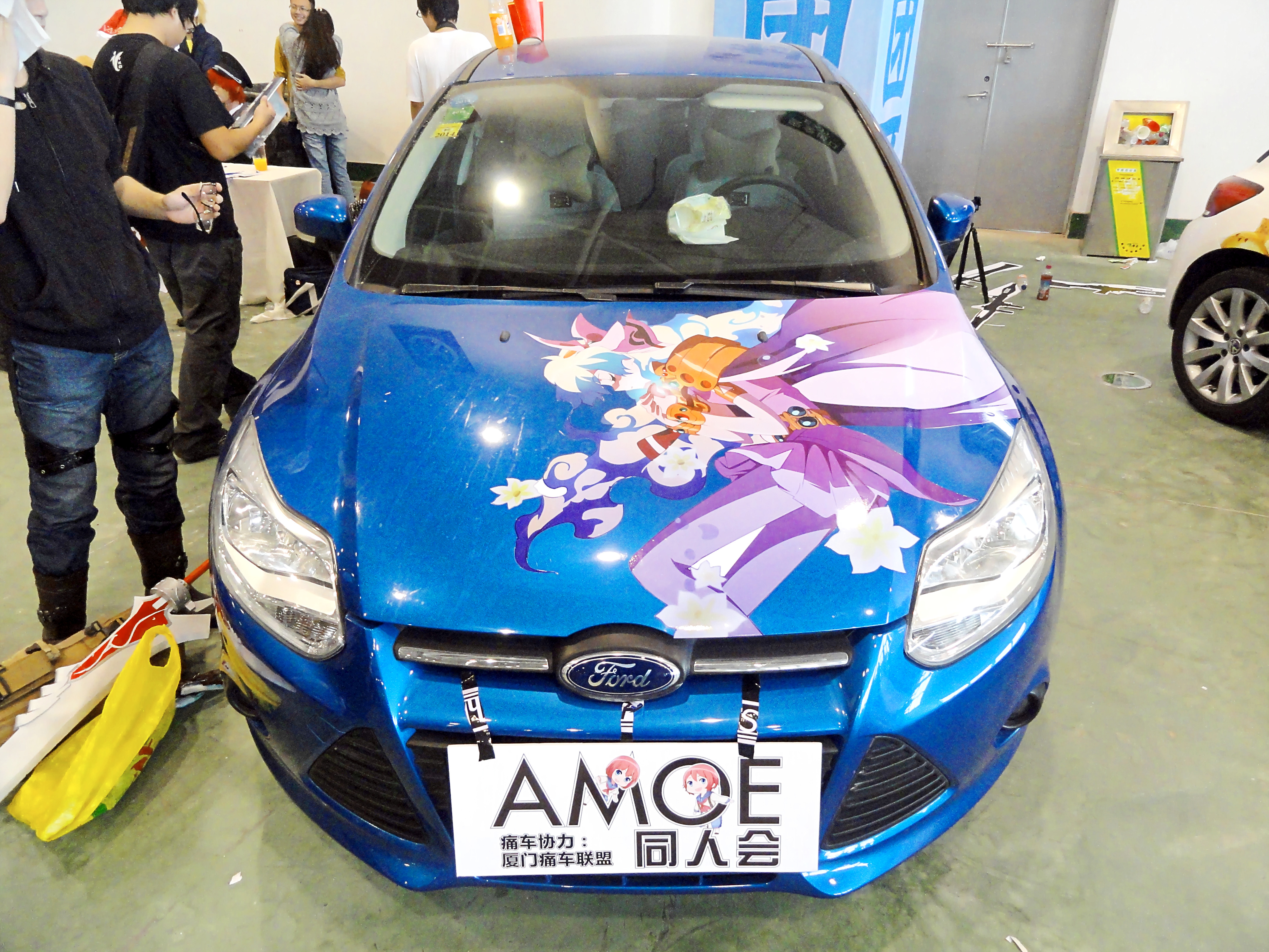 中文（中国大陆）: 在厦门第八届AMOE同人会上拍摄的《天元突破 红莲螺岩》福特Focus痛车。